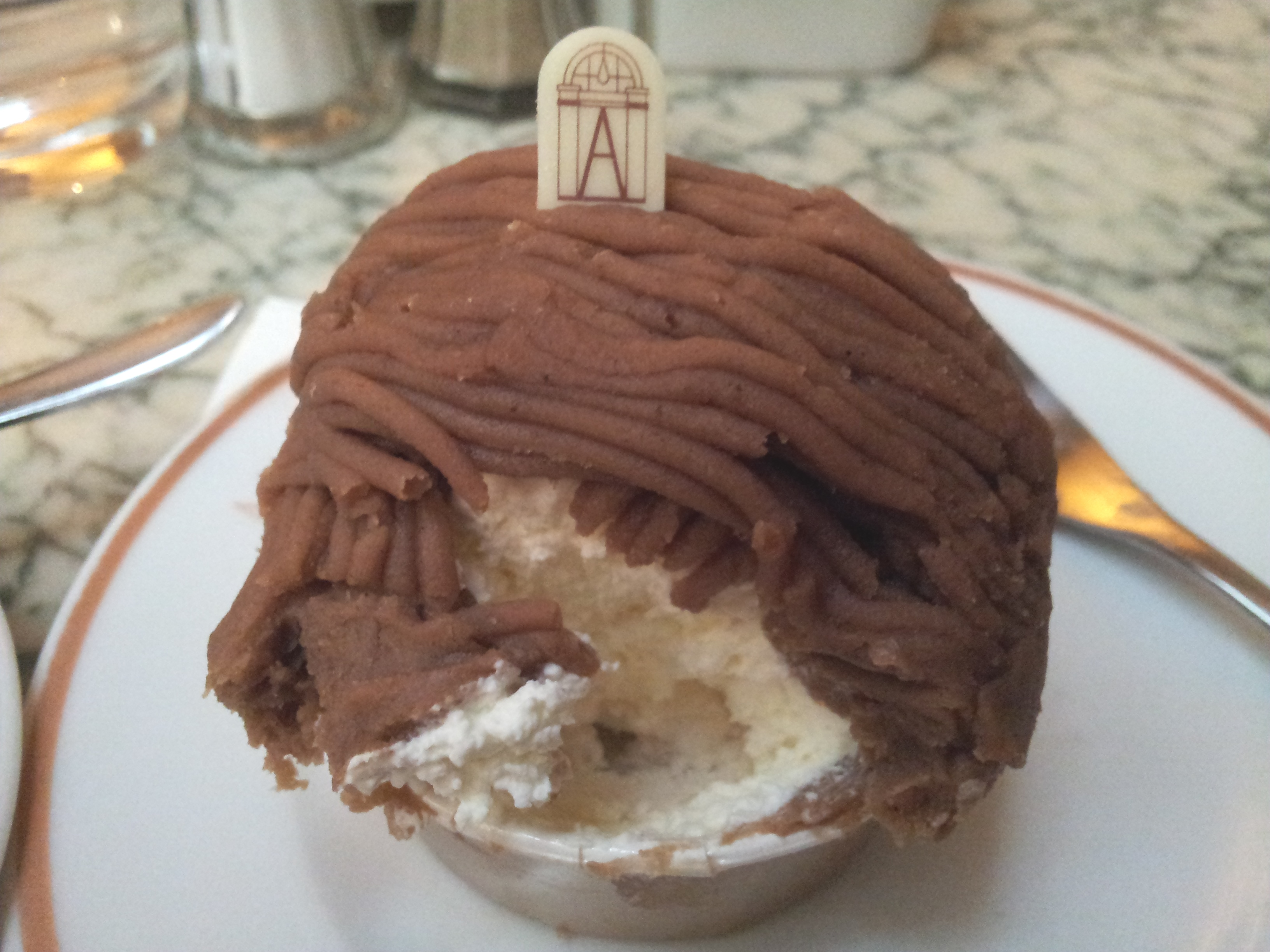 קרם ערמונים בקפה אנג'לינה-פריז